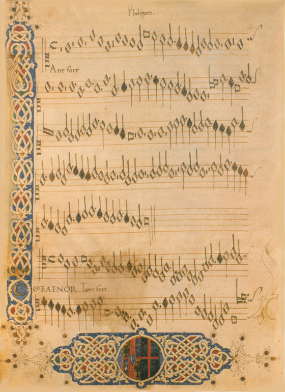 Canzoniere di Isabella d'Este, manoscritto (ca. 1480) , Biblioteca Casanatense, Roma – Italia.